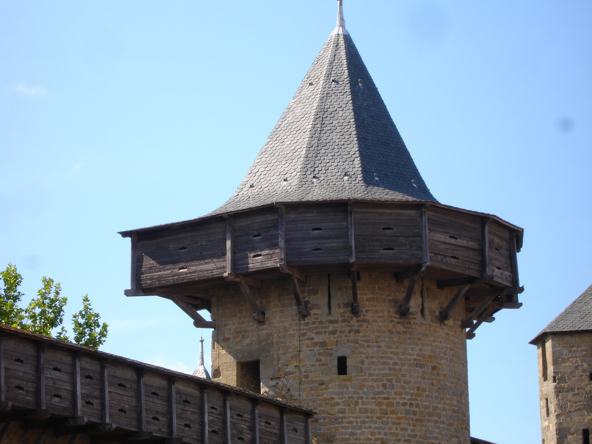 France, Aude (11), Carcassonne, château comtal avec ses hourds